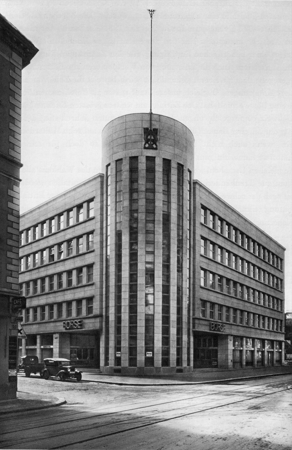 Die «Neue Börse» in Zürich 1930 (heute «Alte Börse»)